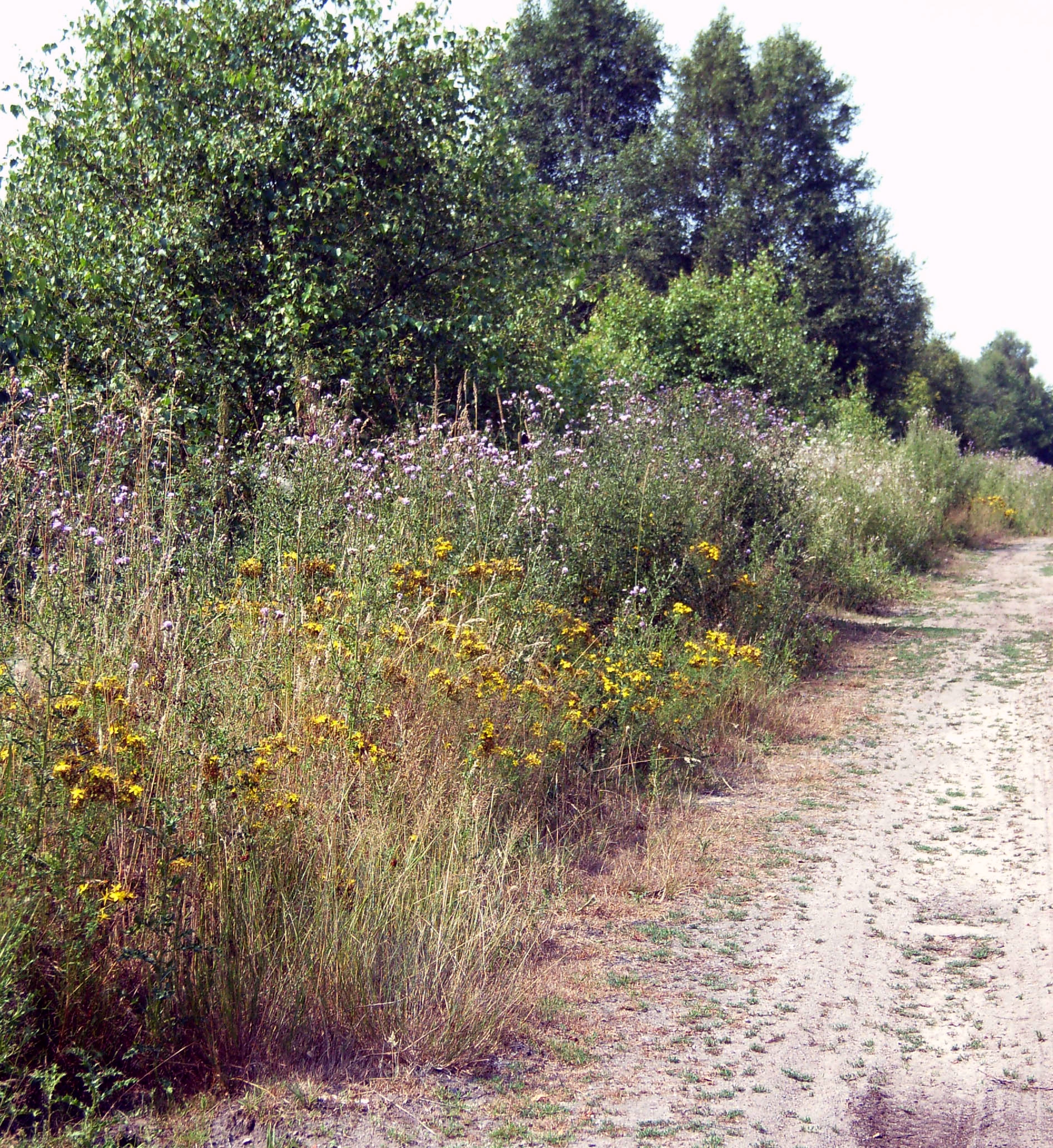 Ruderalvegetation: Wegrand mit Geflecktem Johanniskraut (Hypericum maculatum), Ackerkratzdistel (Cirsium arvense) und Gräsern, Nordwestdeutschland